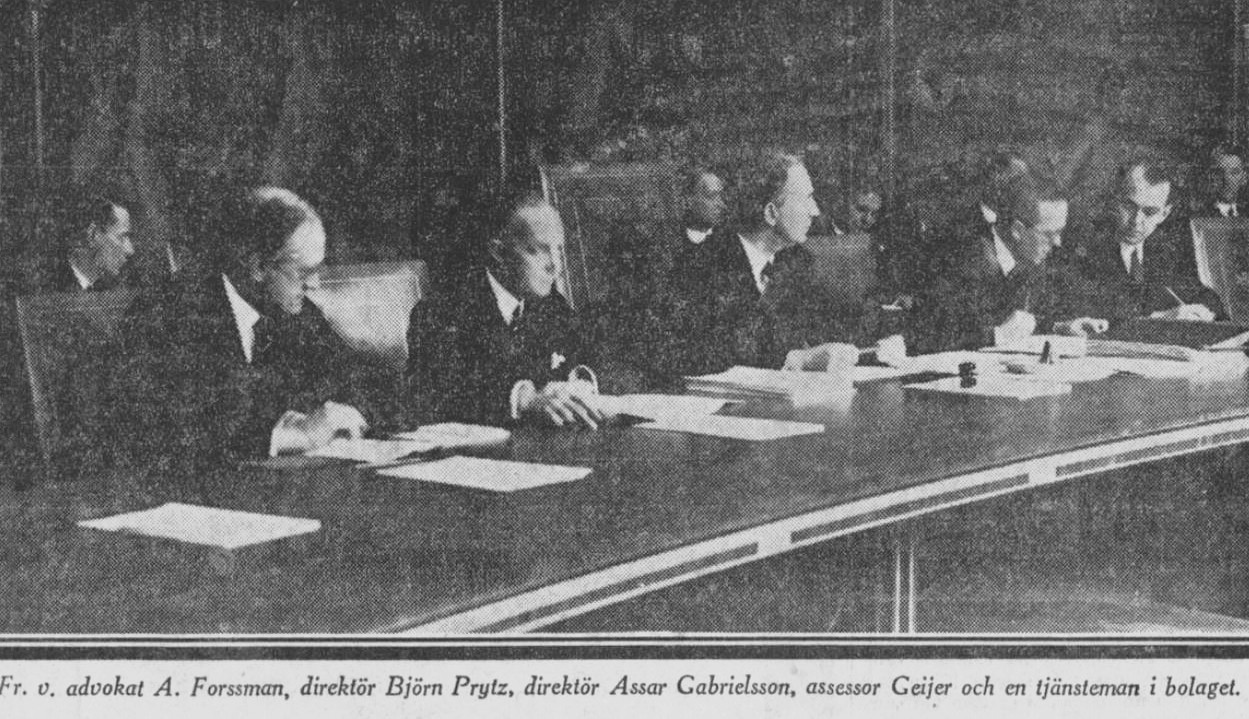 Sammanträde i Tändstickspalatsets sessionssal. Fr. vä. advokat Axel Forsman, direktör Björn Prytz, direktör Assar Gabrielsson, assessor Geijer och en tjänsteman i bolaget.